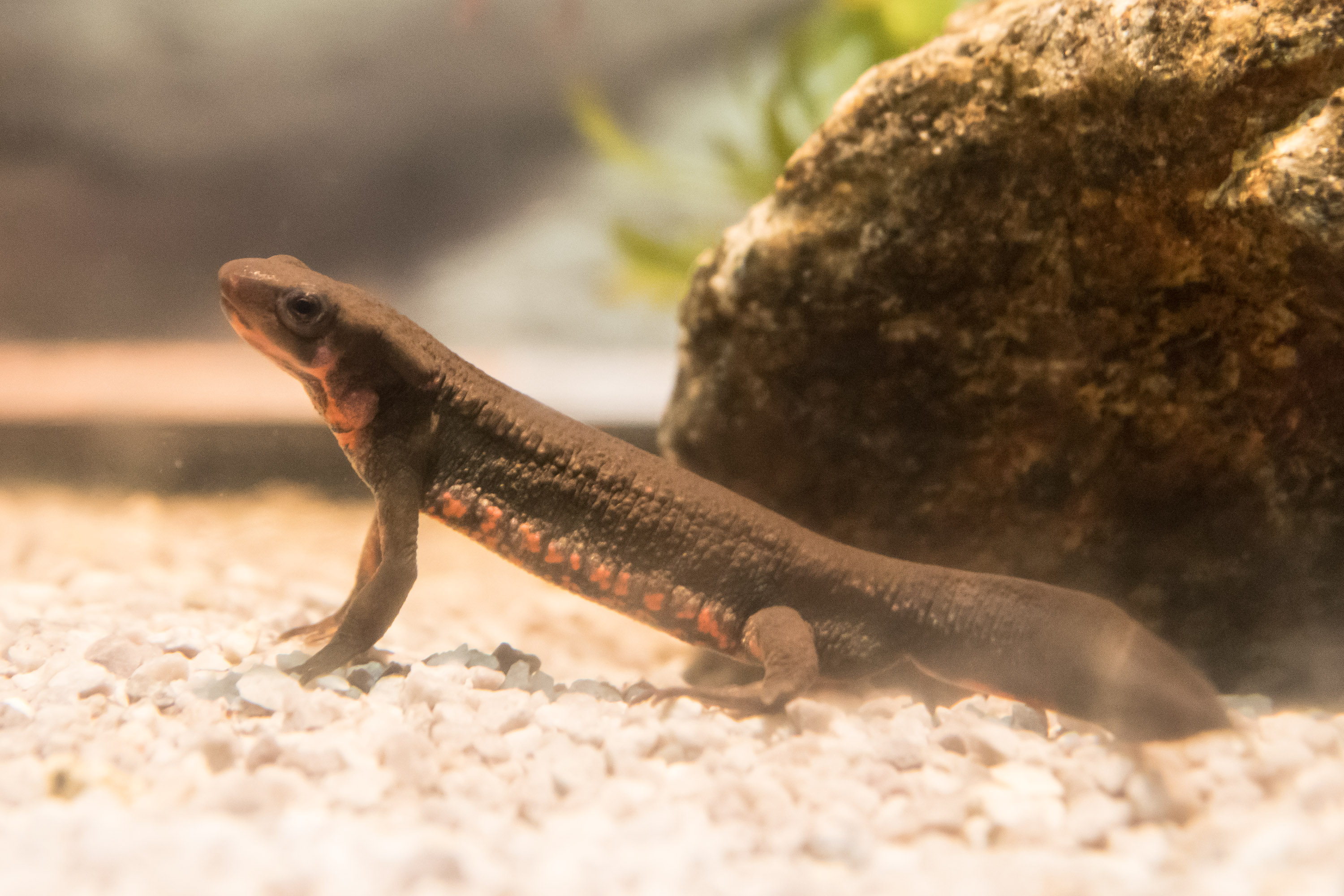 アカハライモリ (学名:Cynops pyrrhogaster)